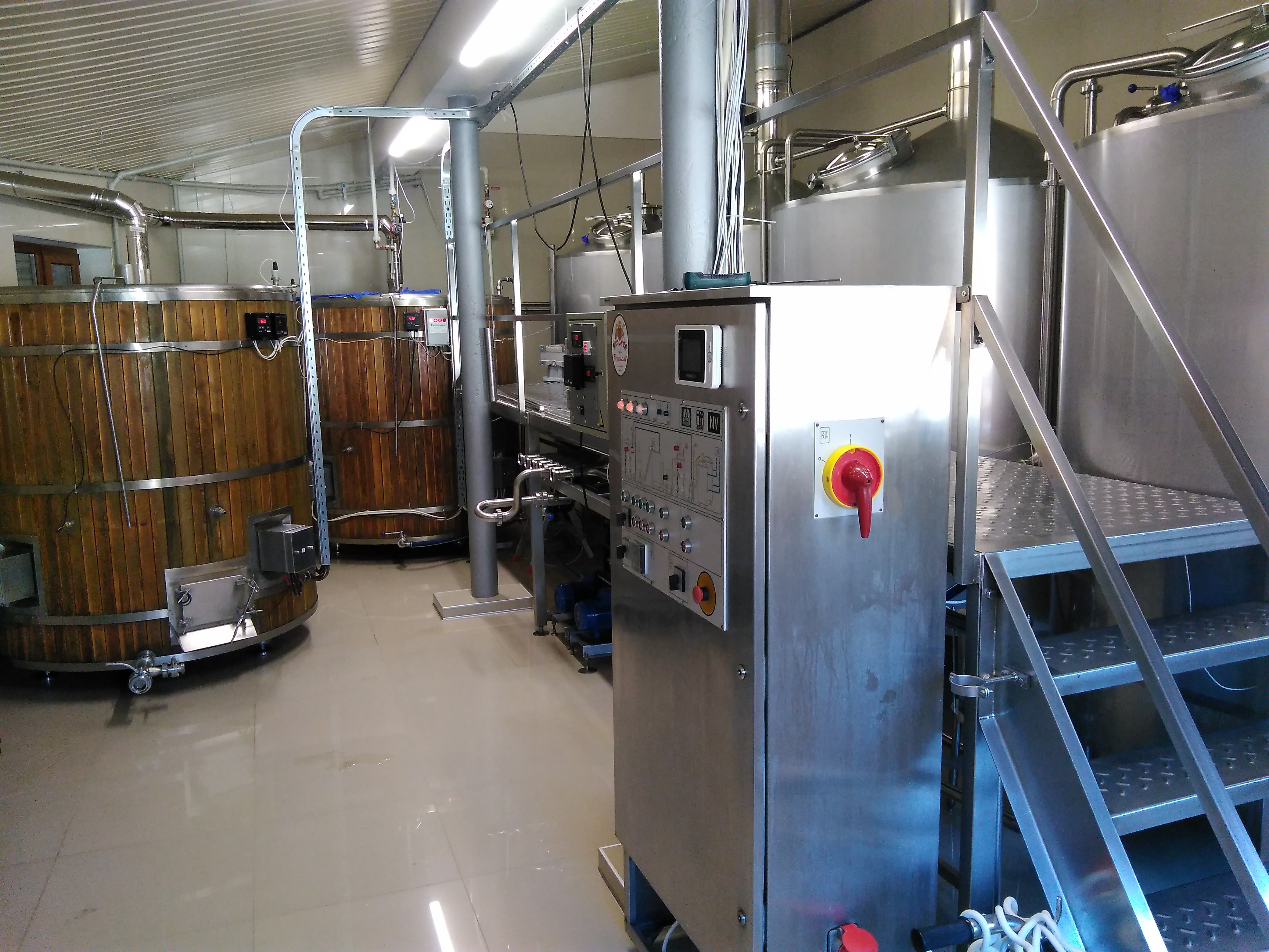 В 2019 році броварня "Микуличин" обновила основне обладнання варильного відділення